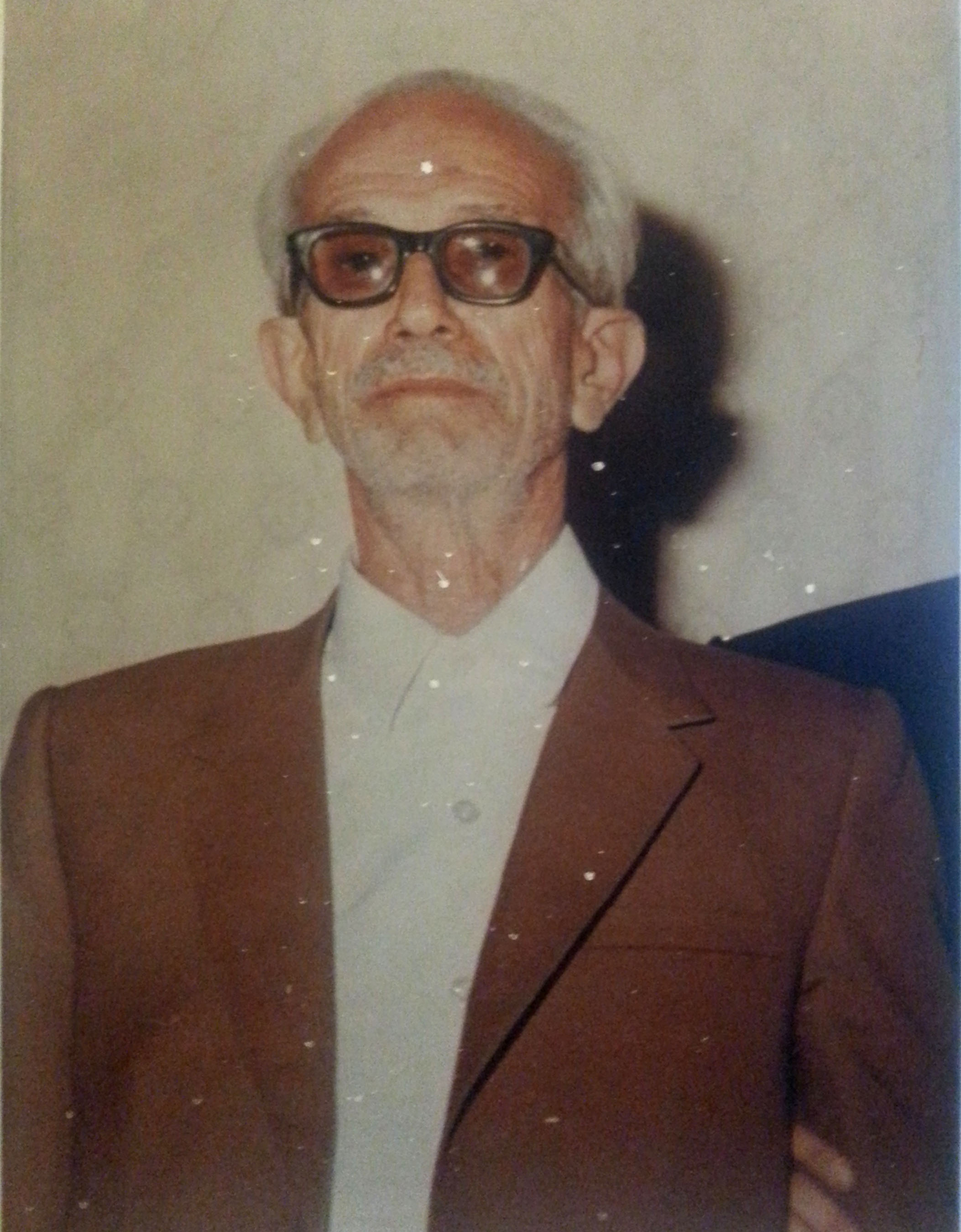 محمد نمازی